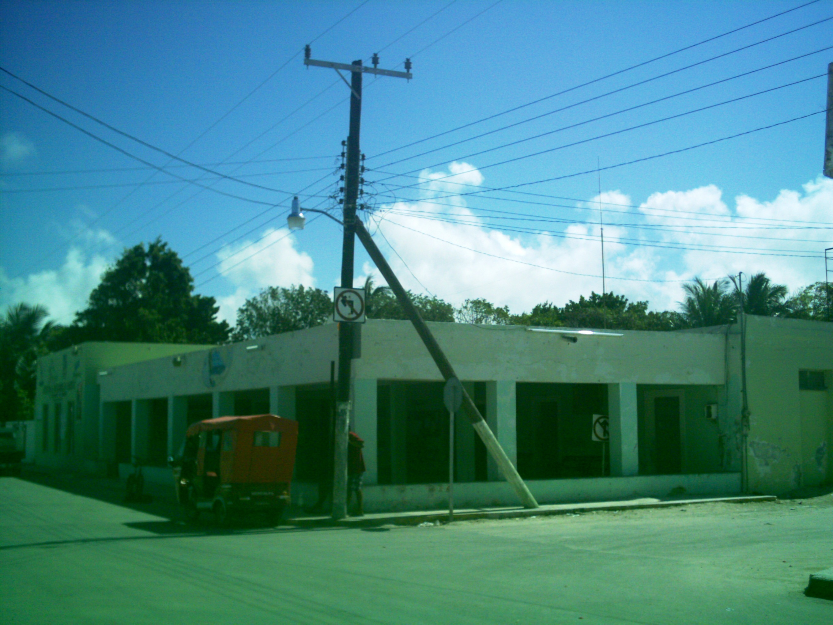 Casa comisarial de Chuburná Puerto, Yucatán.